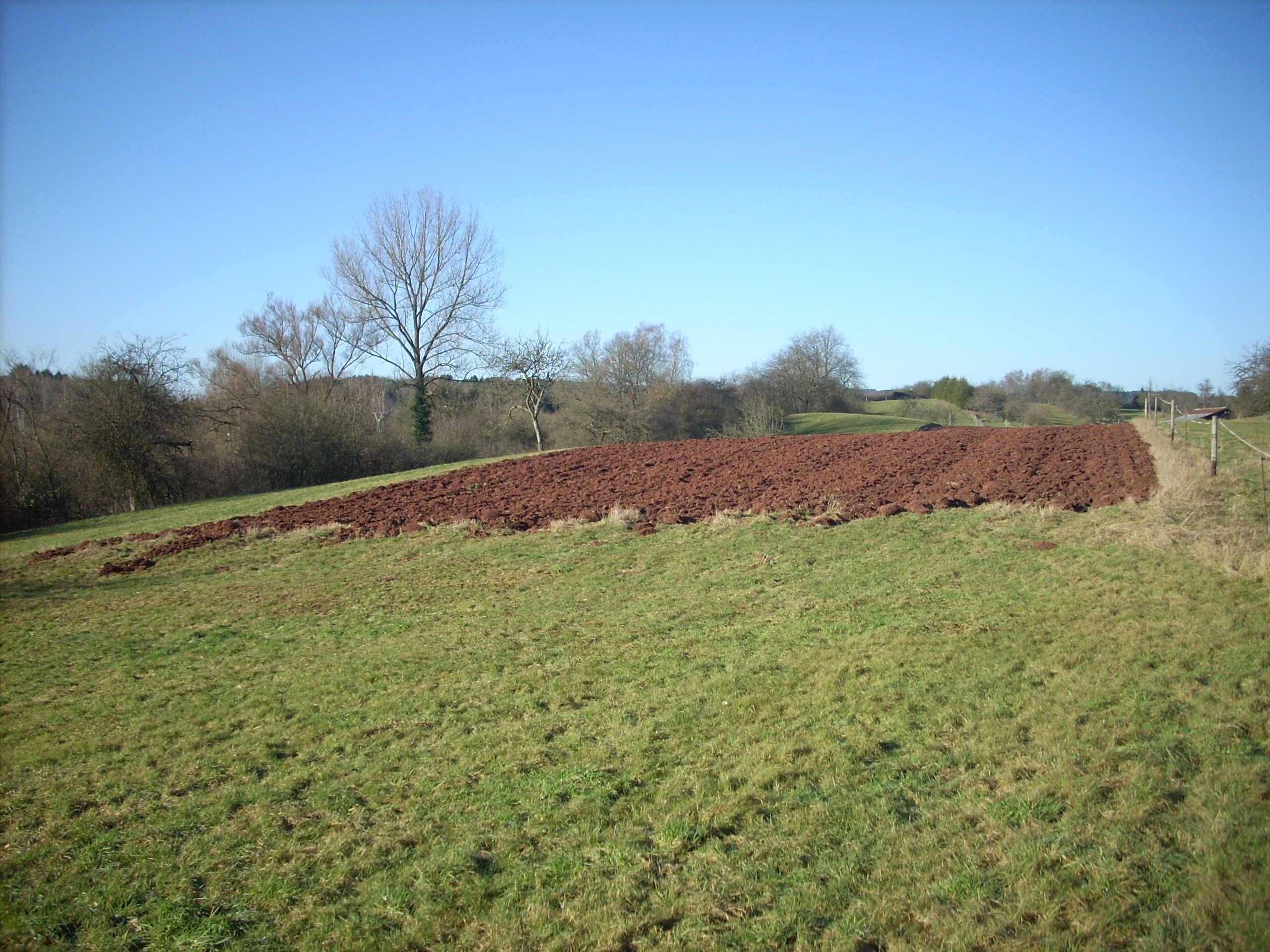 Frisch gepflügter, braunroter Ackerboden, hervorgegangen aus Sedimentgesteinen des Oberrotliegend (nach Falke, 1954: Waderner Gruppe des Saarpfälzischen Rotliegend) bei Namborn (Bliesener Weg), Saarland.